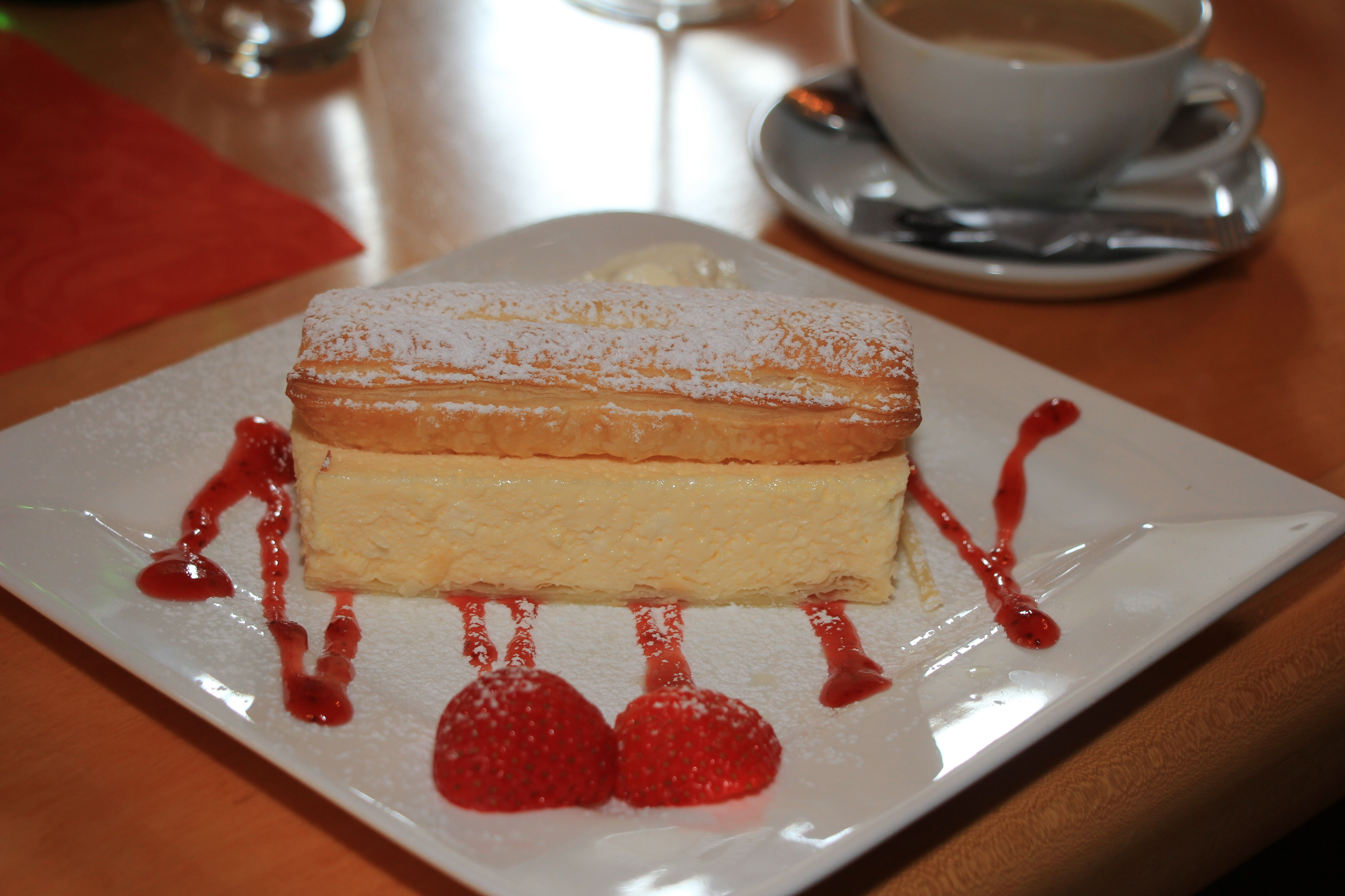 Cremeschnitte gesehen und gegessen in Gumpoldskirchen, Niederösterreich